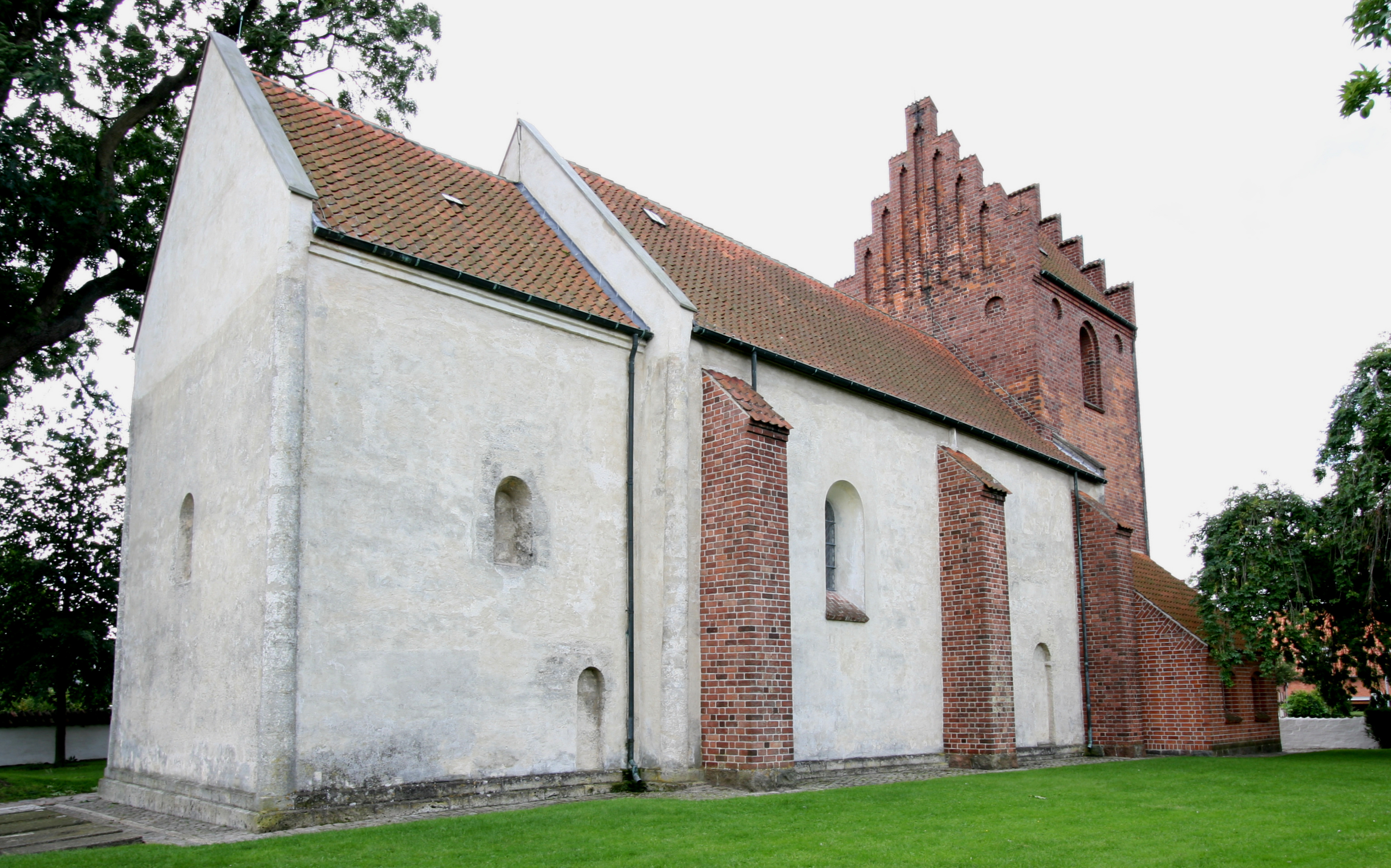 Sankt Jørgensbjerg Kirke in Roskilde, Denmark. View from rear of church.